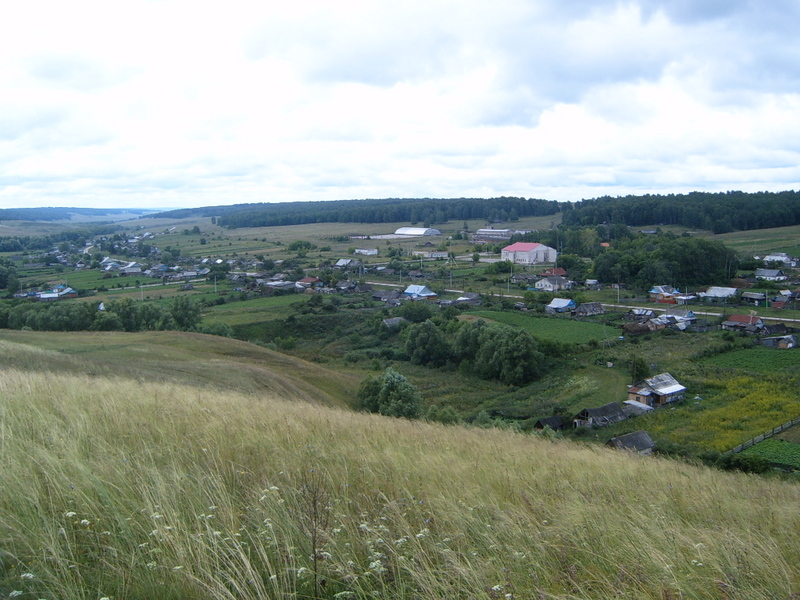 Вид села Новые Сосны